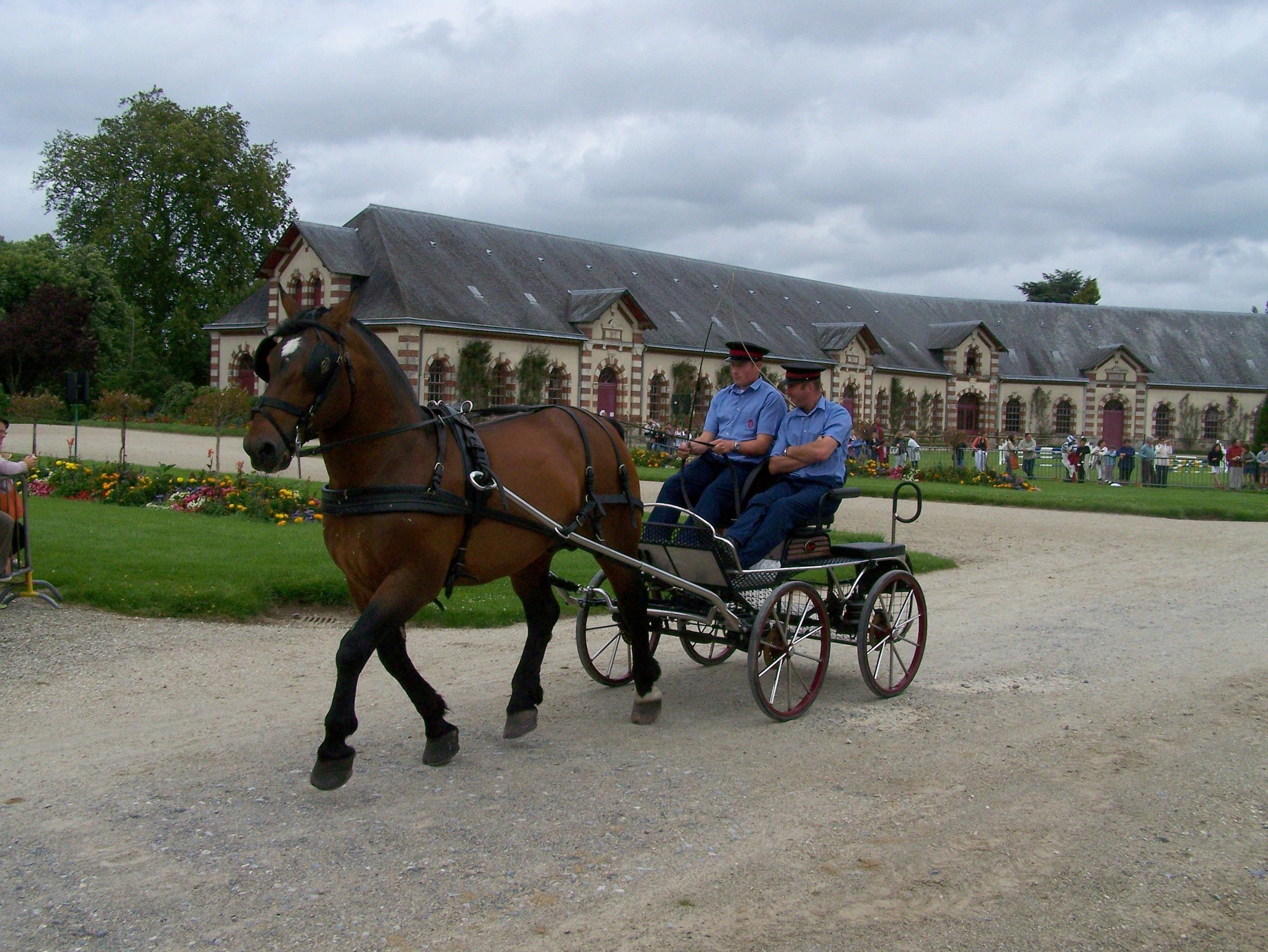 For